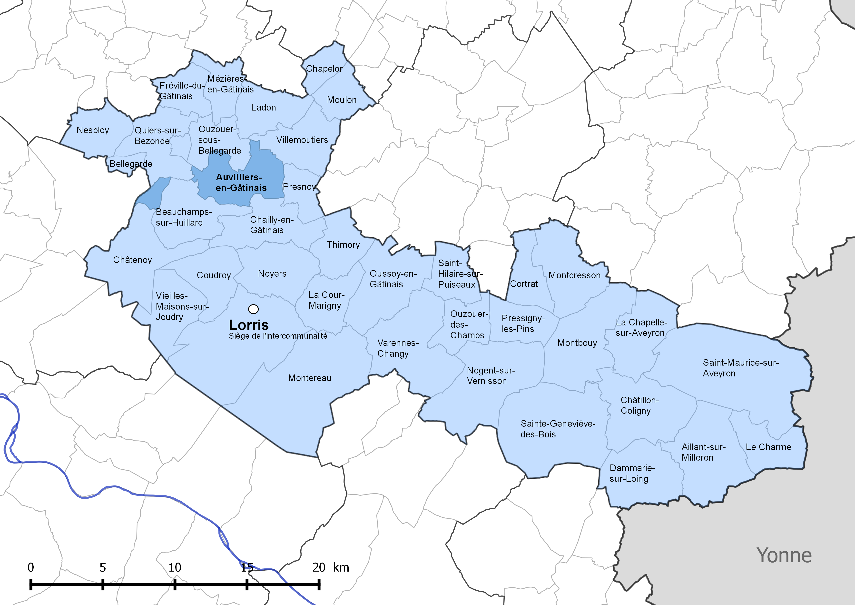 Périmètre de la communauté de communes Canaux et forêts en Gâtinais - Situation de la commune de Auvilliers-en-Gâtinais